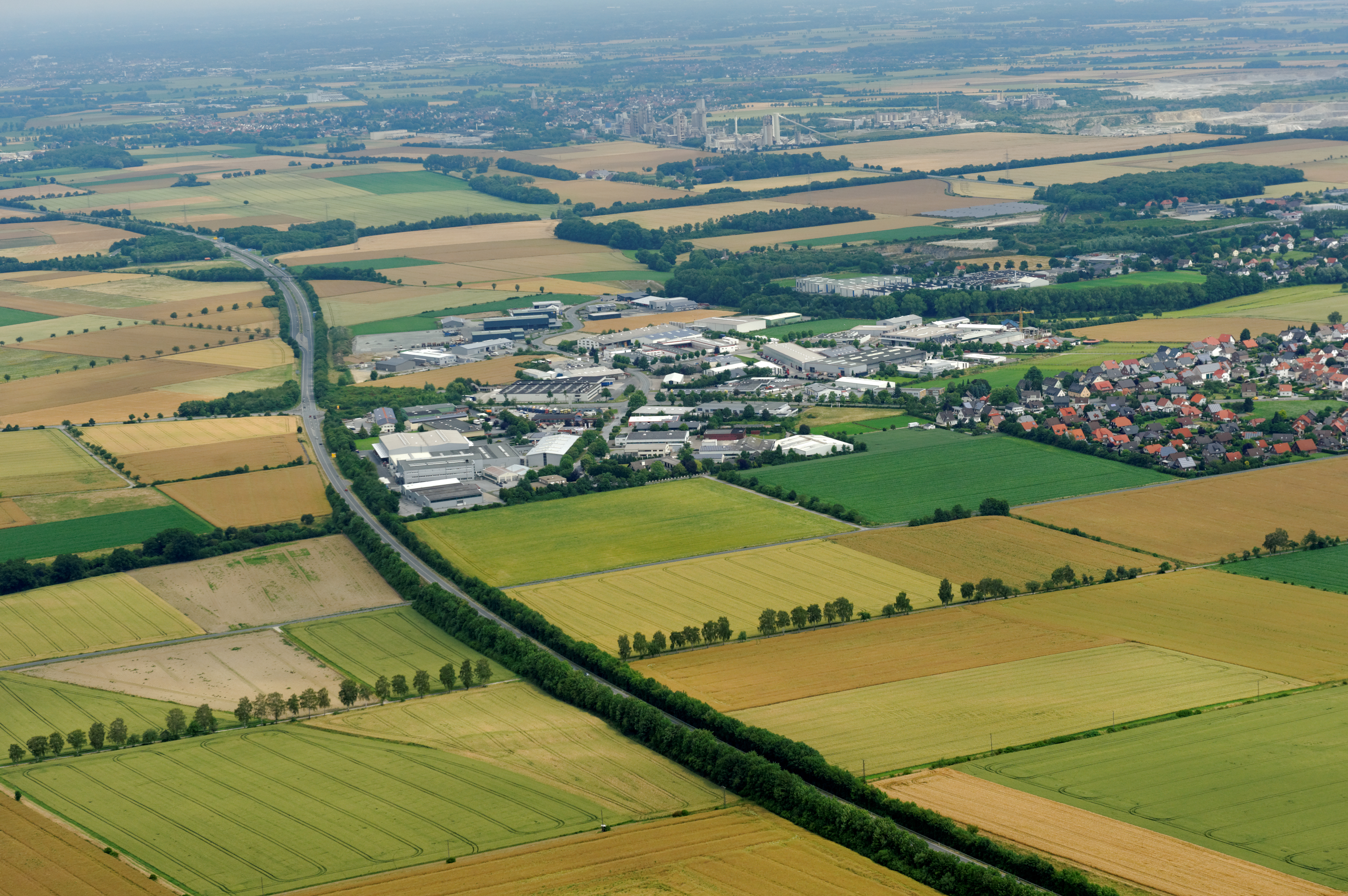 Fotoflug Sauerland Nord: Anröchte, Gewerbepark, Naturschutzgebiet „Güller Bach–Lobbenbach“, Bundesstraße 55, Bundesautobahn 44, oben Steinbruch und Portlandzementwerk bei Erwitte, Blickrichtung Nord